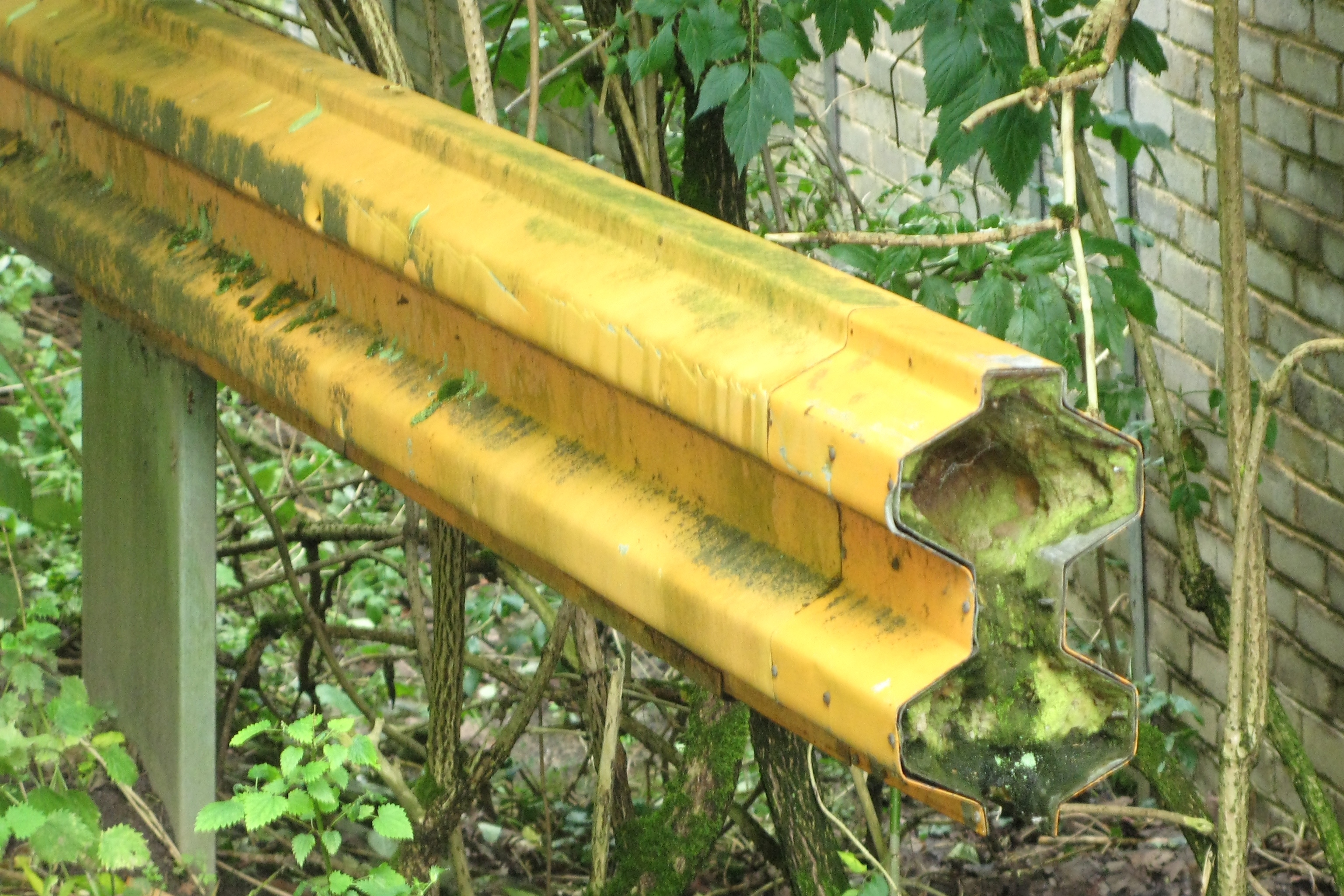 Reschter vun enger GLADU- Leitplank op der Teststreck am Greisendall zu Diddeleng.